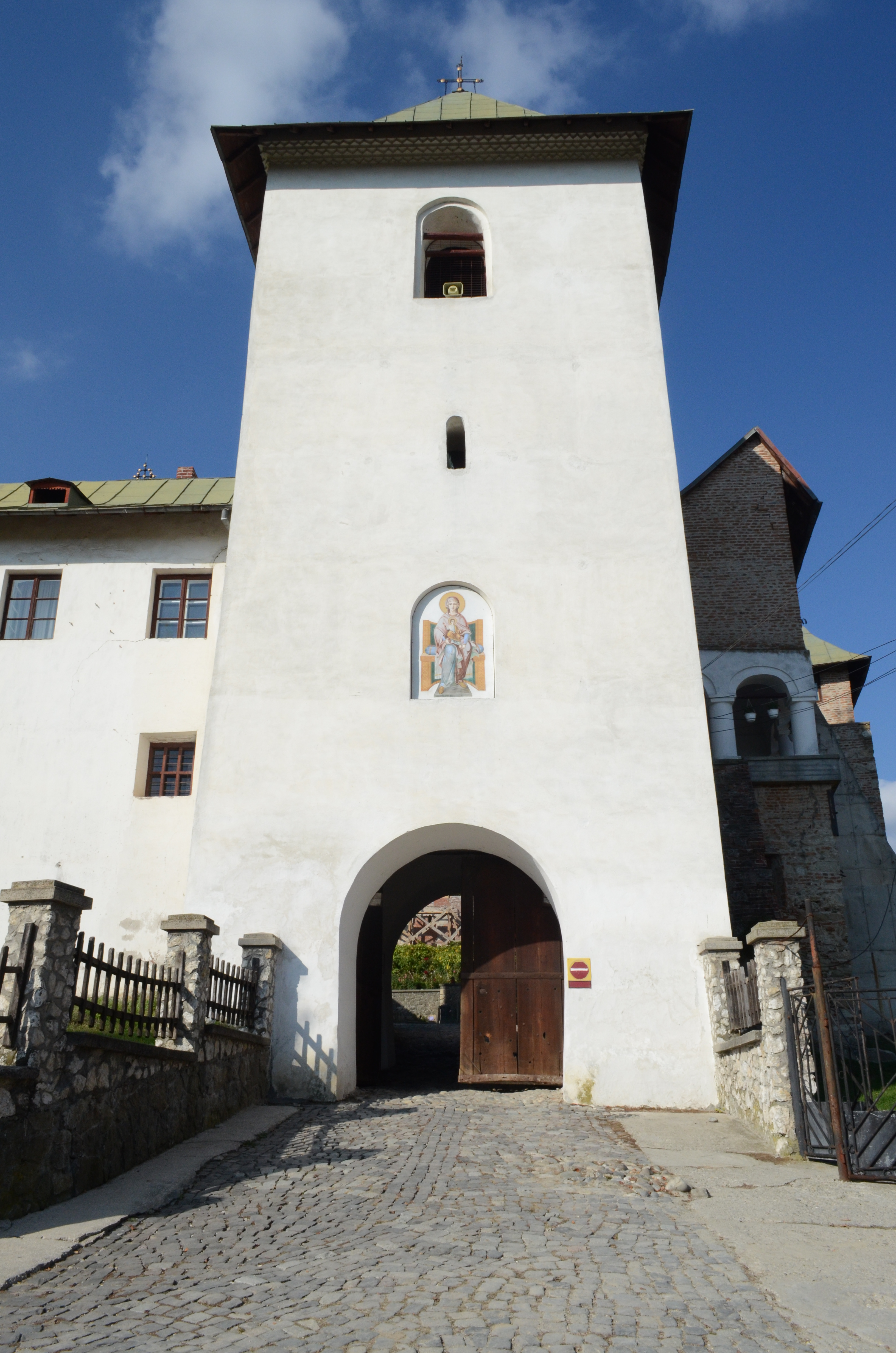 Turnul clopotniță de la Mănăstirea Govora